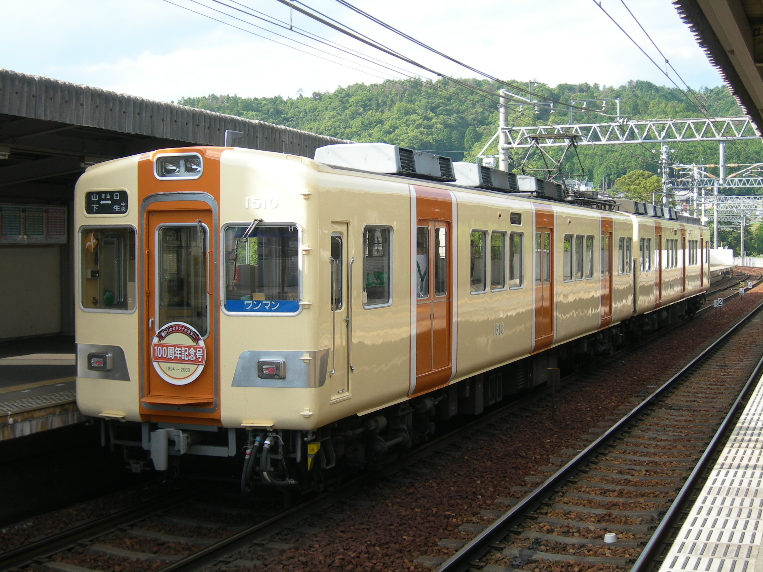 能勢電鉄1500系電車（フルーツ牛乳塗色〈オレンジ+クリーム〉）